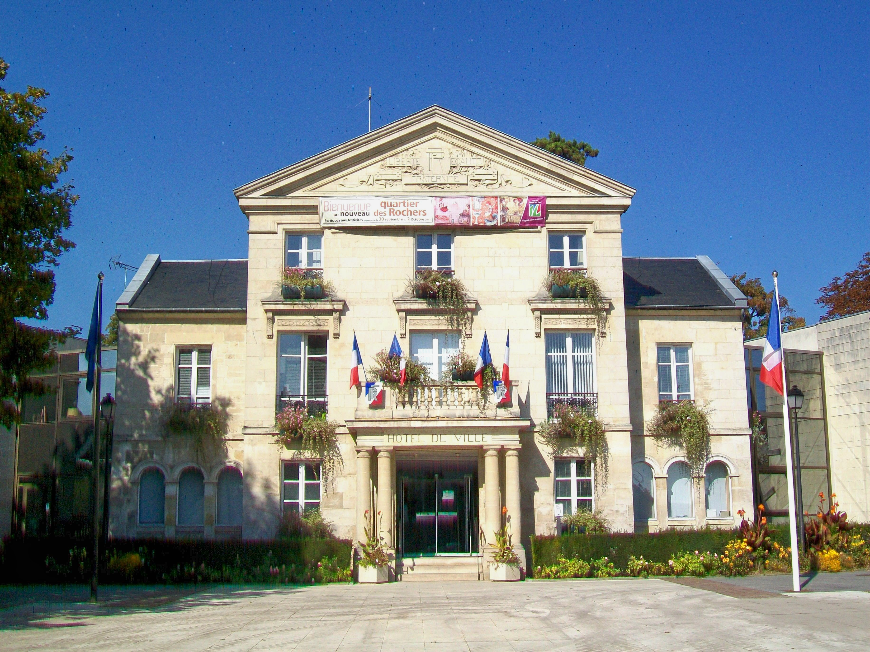 L'hôtel de Ville de Nogent-sur-Oise, ancienne maison bourgeoise de 1822, transformée en mairie en 1910.